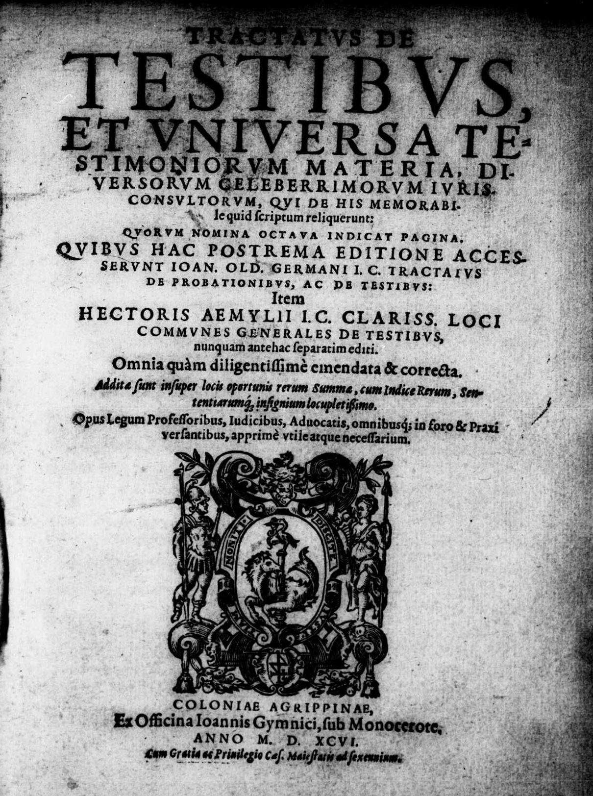 Frontespizio